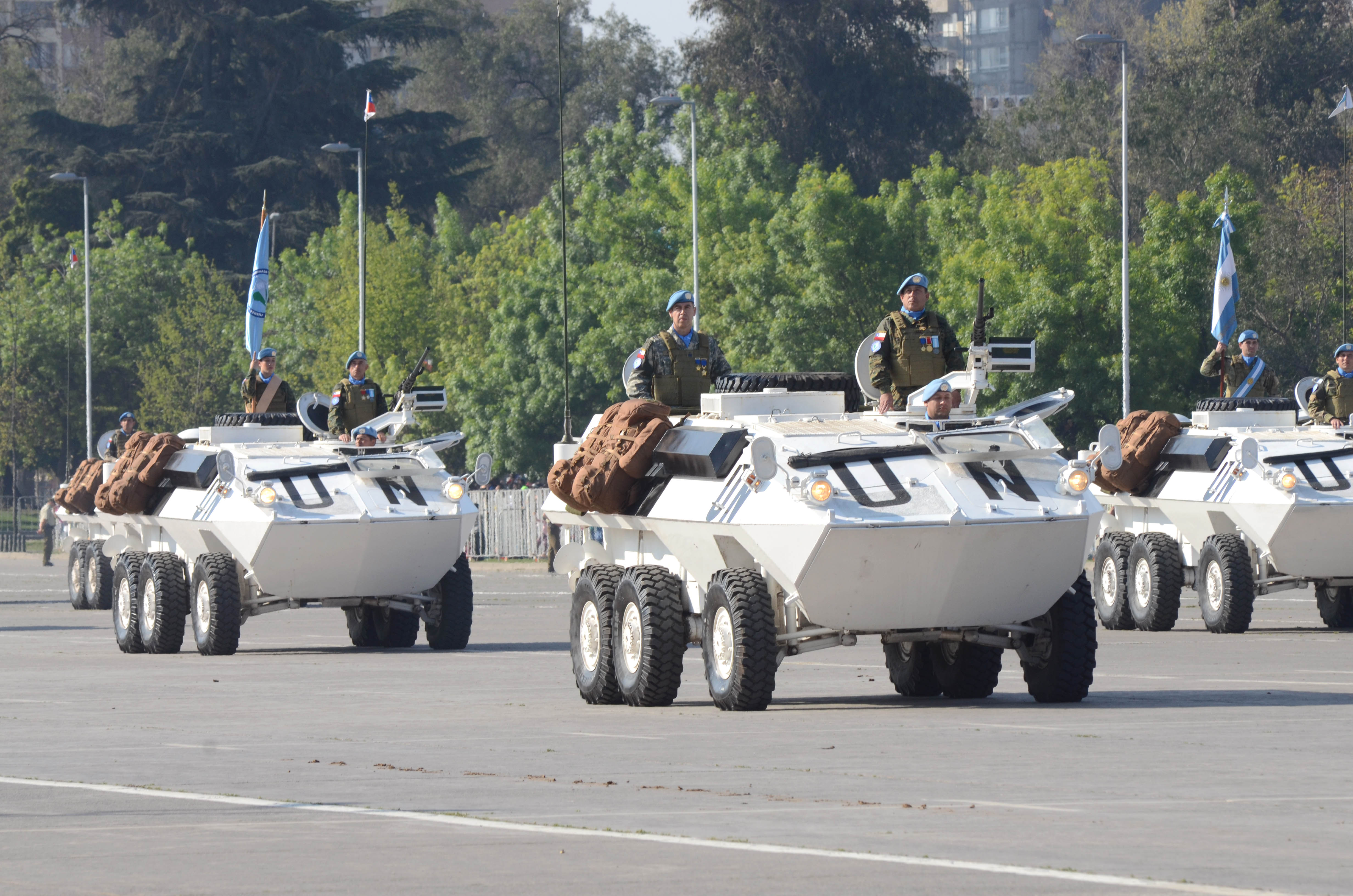 Parada Militar 2014, FAMAE Piranha 6X6